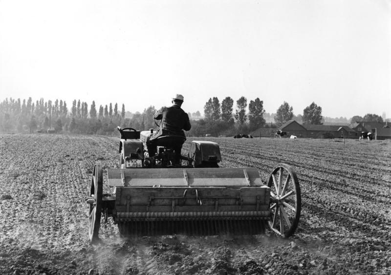 Landwirtschaftliche Aufnahmen in Lobberich bei Viersen am 20.9.1957 Jungbauer mit Düngemaschine bei der Arbeit auf dem Feld Information added by Wikimedia users.